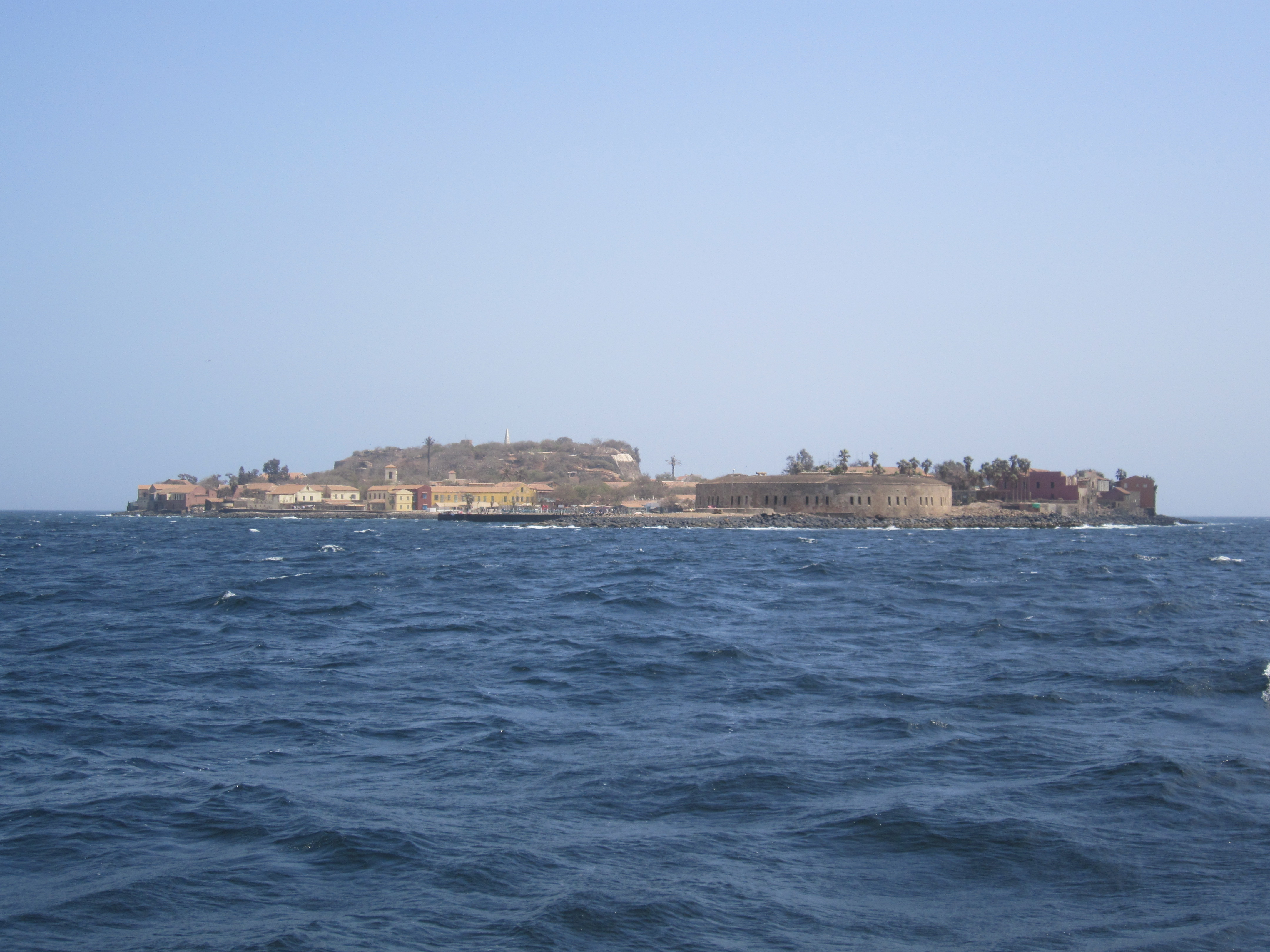 vue de l'île de Gorée depuis le bateau This is an image with the theme "Africa on the Move or Transport" from: Senegal